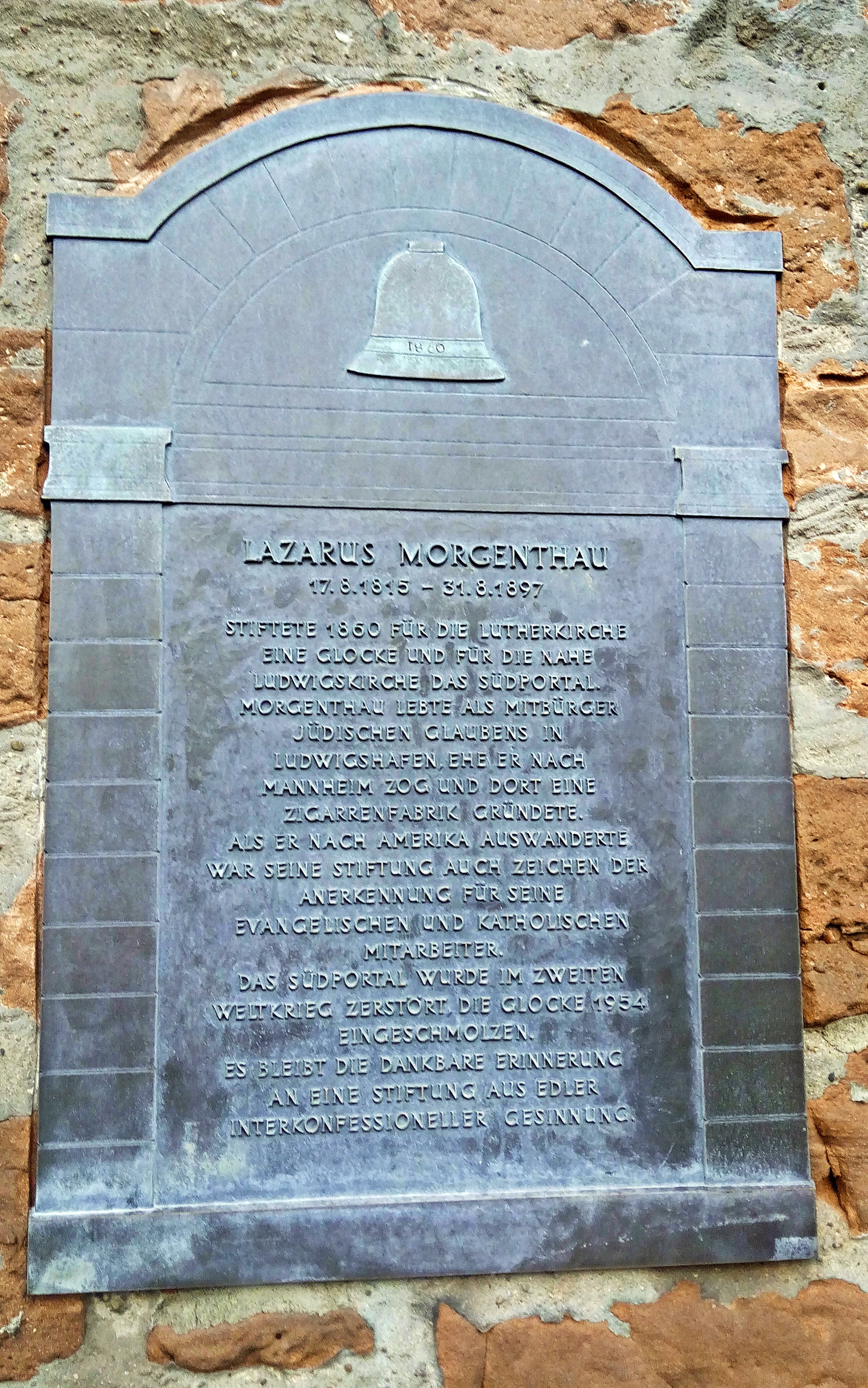 Lutherkirche Morgenthautafel